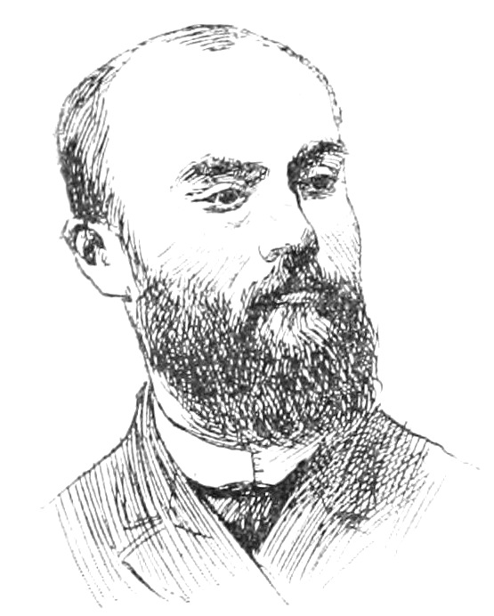 "La Nouvelle Chambre" : "Cazals".